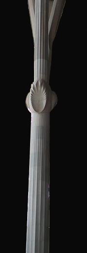 Columna de la nave interior del Templo de la Sagrada Familia de Barcelona